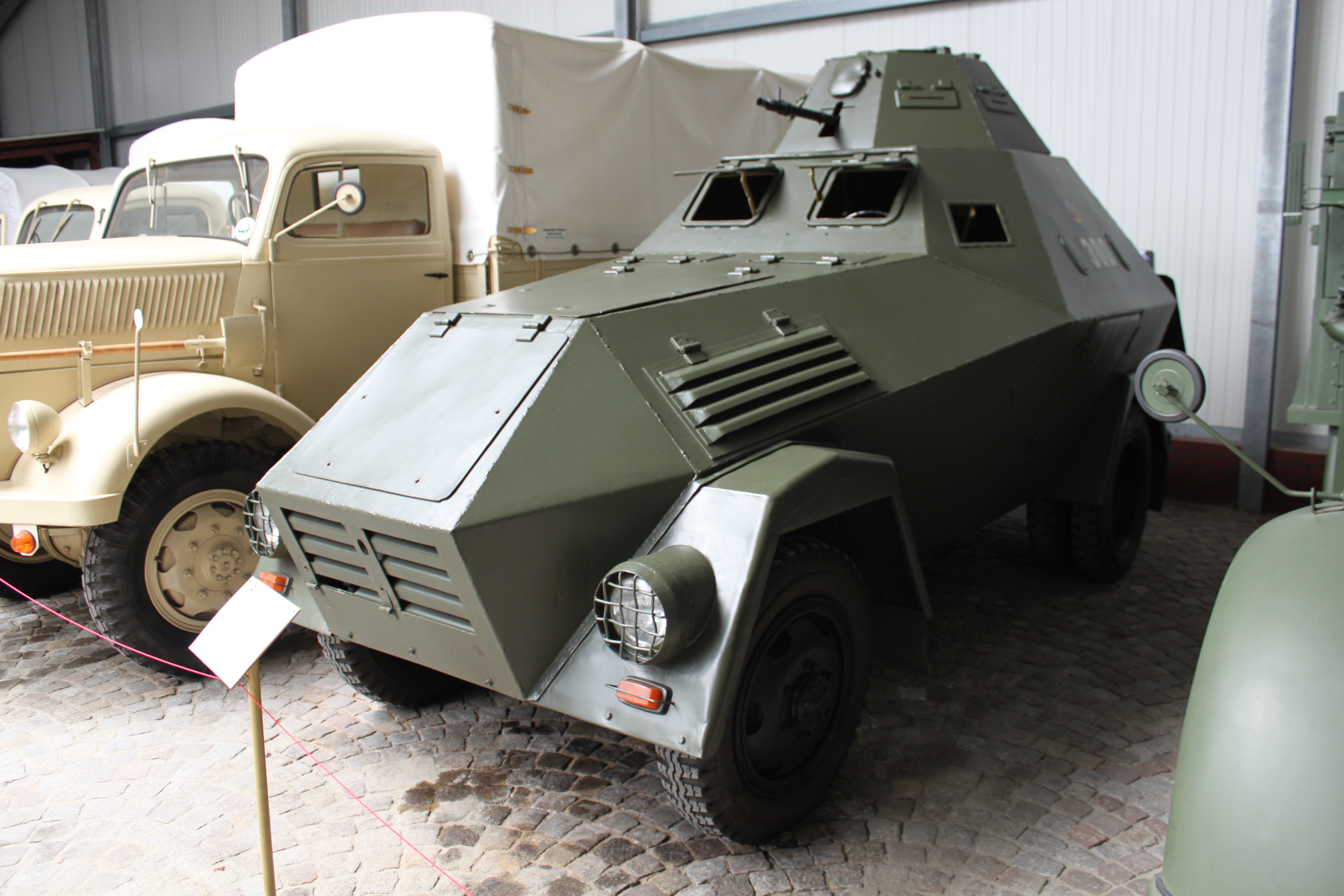 Sonder KFZ 1 im Sächsischen Nutzfahrzeugmuseum Hartmannsdorf. (Mit freundlicher Genemigung des Vereins Historische Nutzfahrzeuge e. V. mit Sitz in Hartmannsdorf)